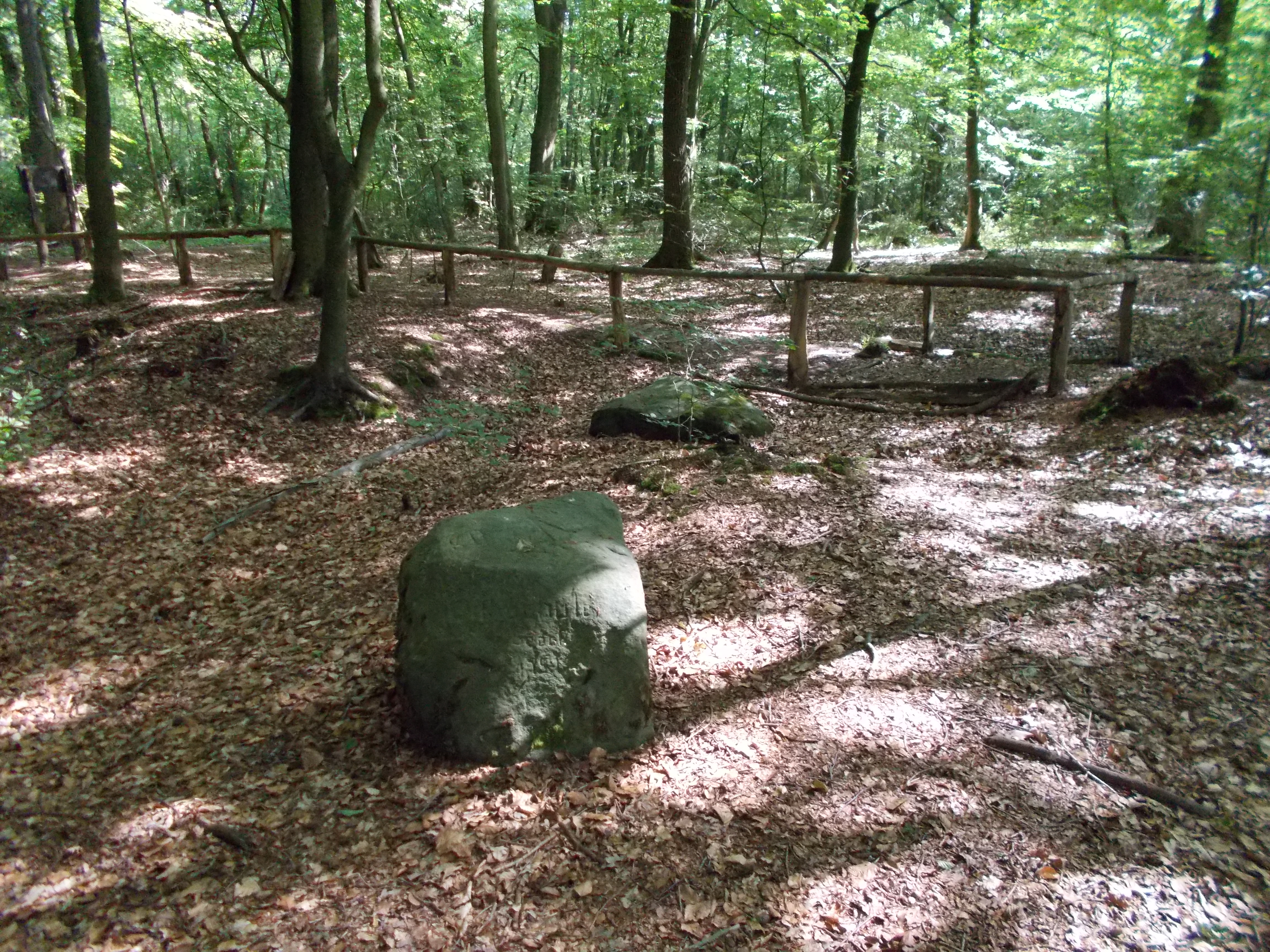 Naturdenkmal Teufelssteine am Teufelssteinweg im Hünxer Wald. ND 27. Die beiden kleinen Teufelssteine mit Ritzzeichnungen.